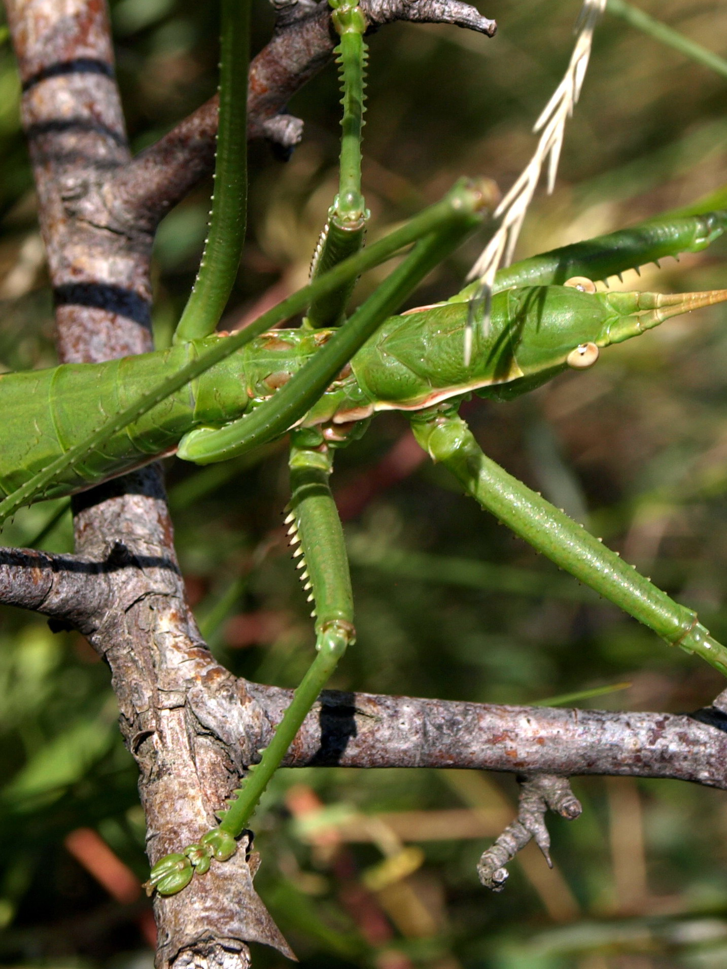 Fűrészeslábú szöcske a Budai-hegységben